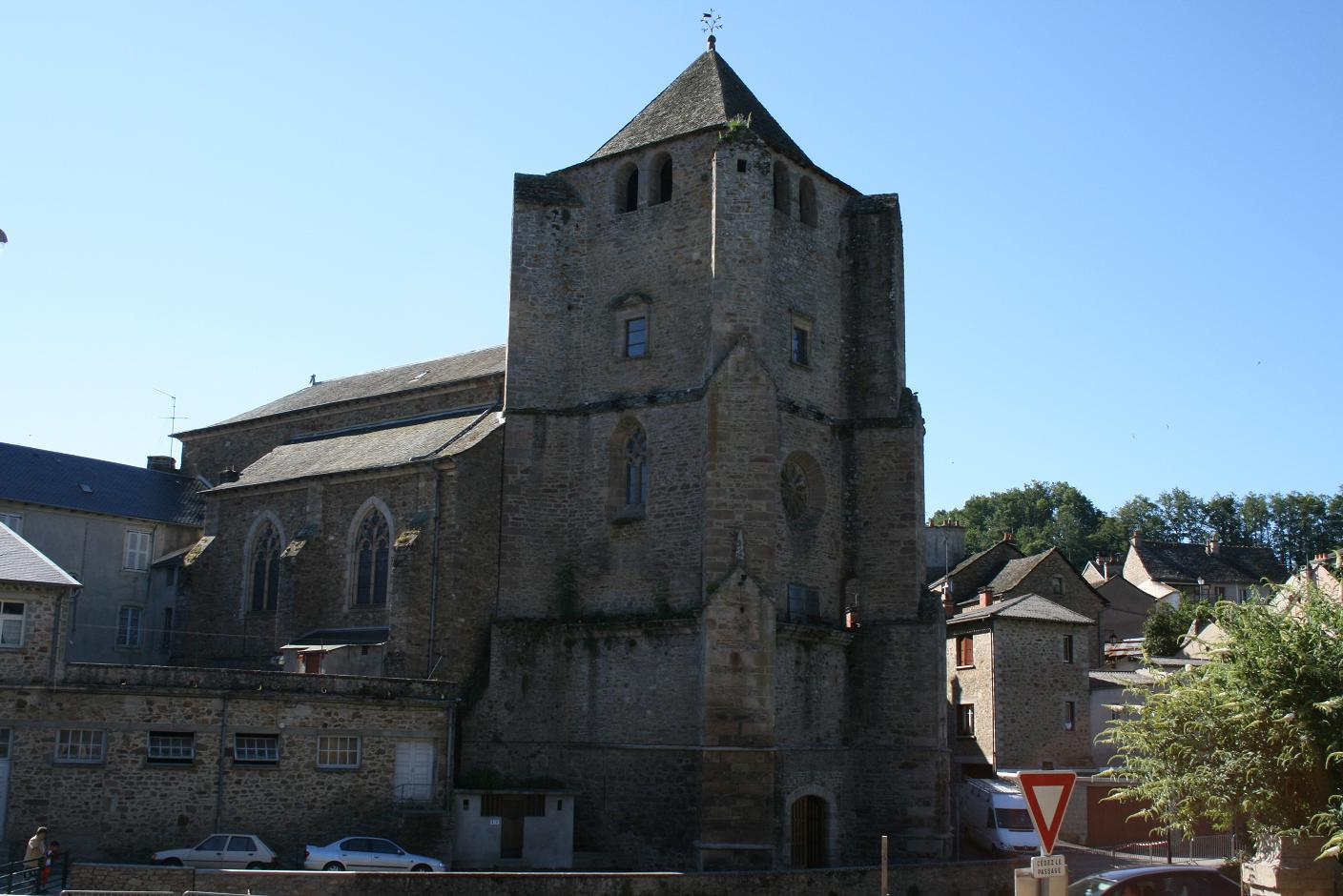 Cassagnes-Bégonhès (Aveyron - France) - Église